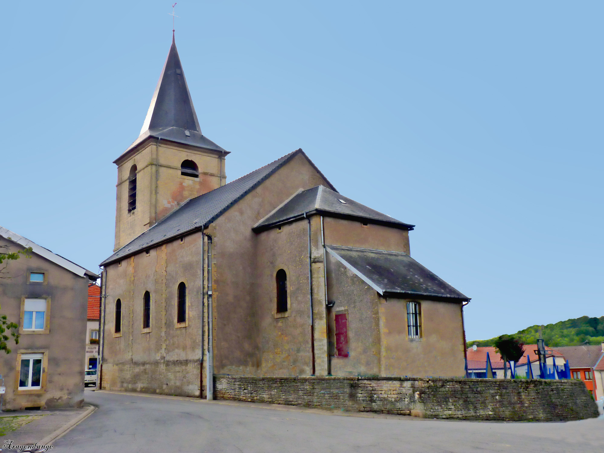 Église paroissiale Saint-Martin construite en 1733